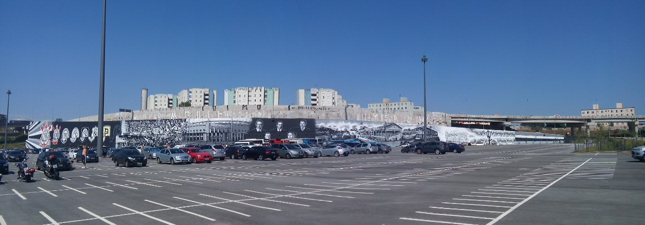 Muro grafitado no Estacionamento do setor oeste da Arena Corinthians